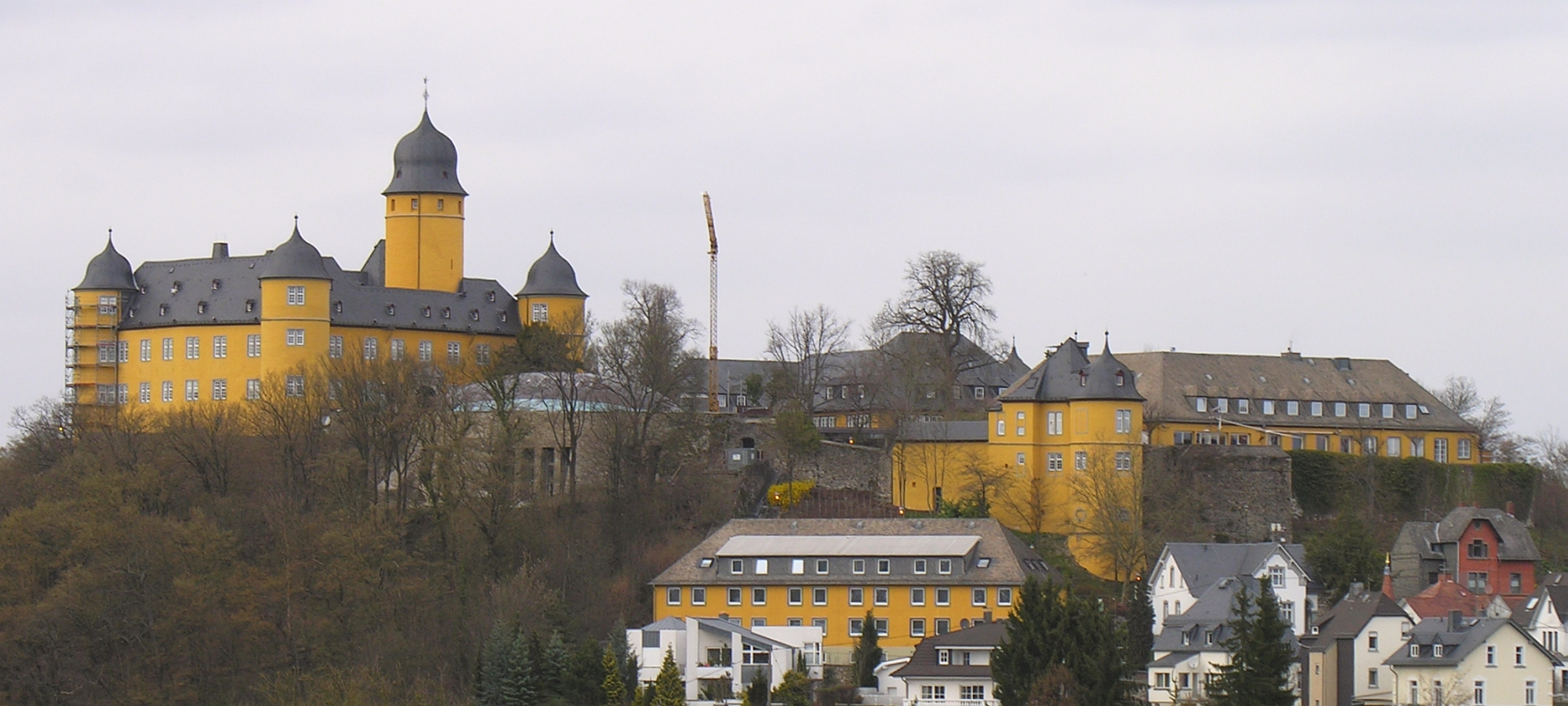 Schloss Montabaur auf dem Schlossberg im Zentrum von Montabaur im Westerwaldkreis in Rheinland-Pfalz - Foto Wolfgang Pehlemann DSCN6539